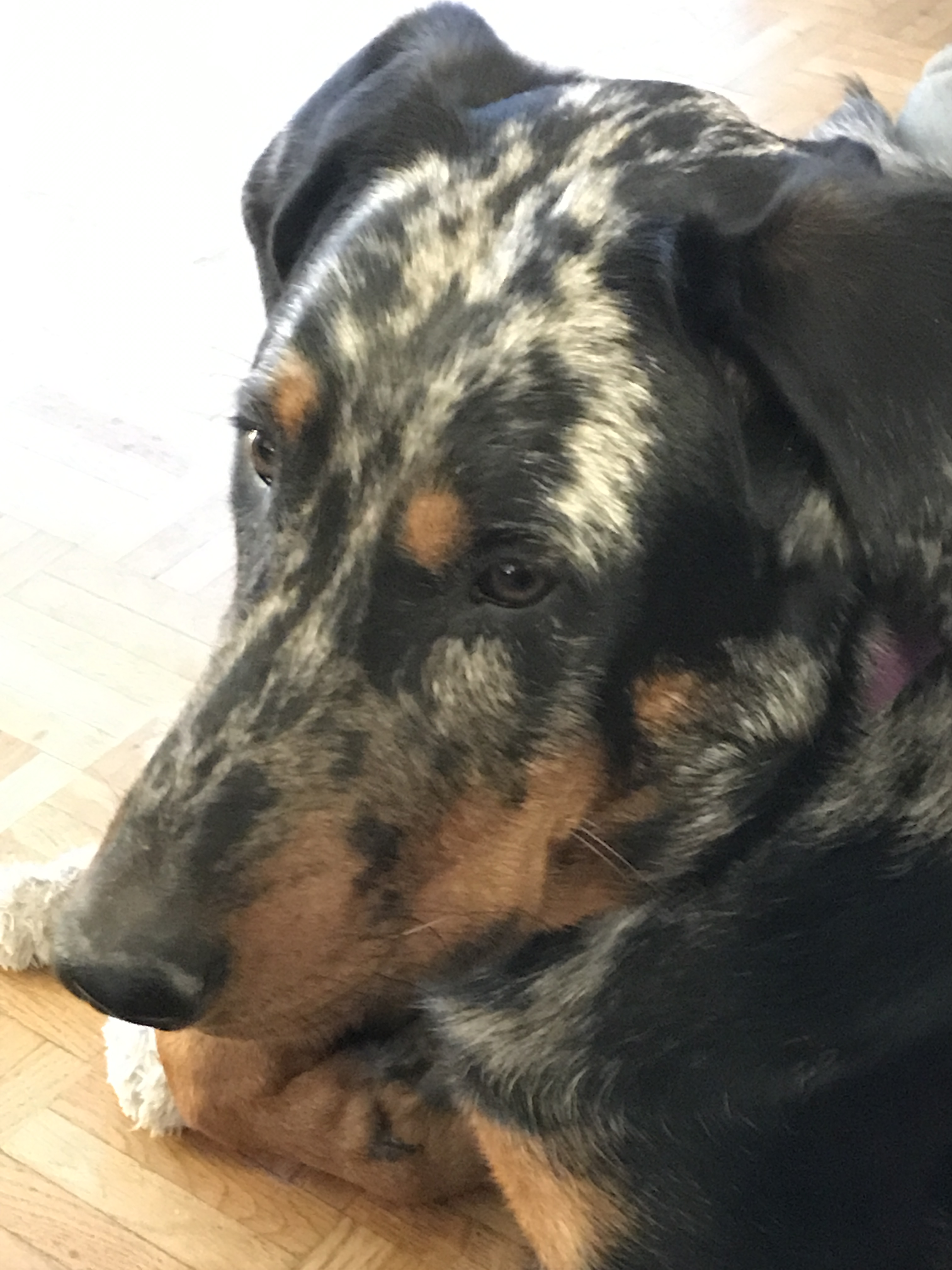 Détails des taches et couleurs beauceron arlequin adulte